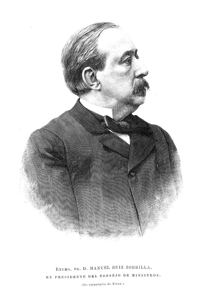 Retrato de Manuel Ruiz Zorrilla, publicado en la revista española La Ilustración Española y Americana.